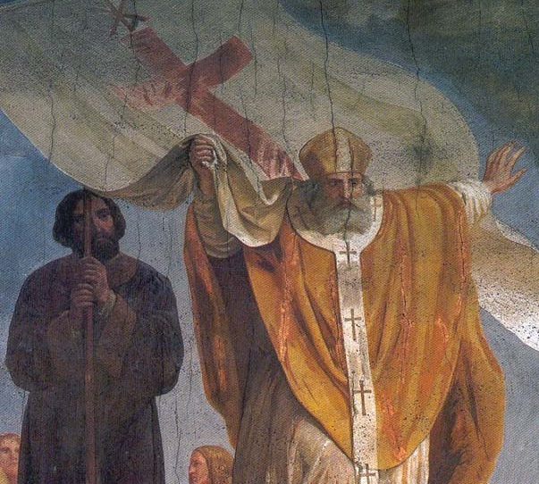 Der hl. Maximus von Turin predigt dem Volk. Apsisfresko von Francesco Gonin in der Kirche San Massimo in Turin (Ausschnitt)